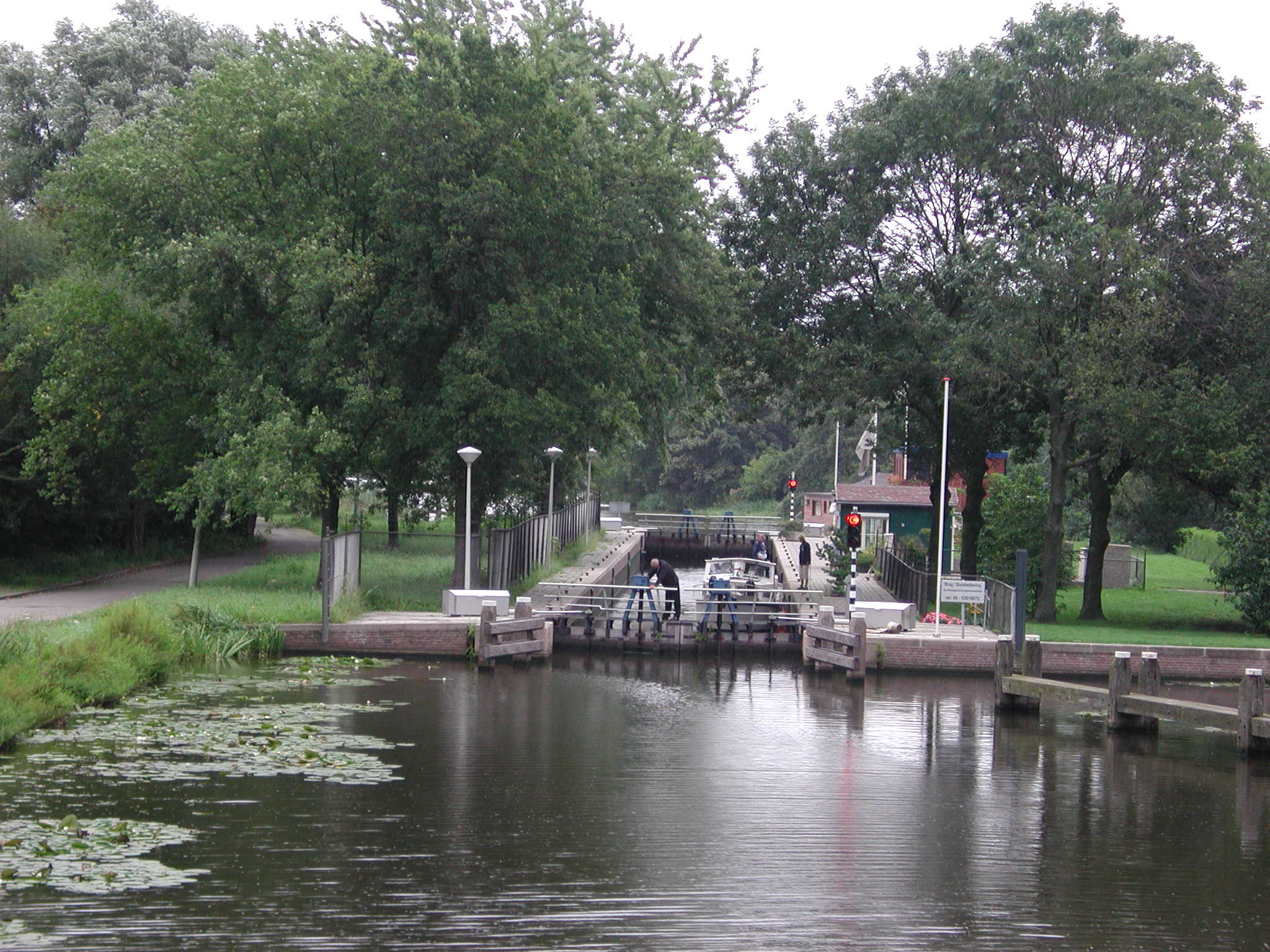 De Bergsluis is een schutsluis in het Noorderkanaal. Eigen foto